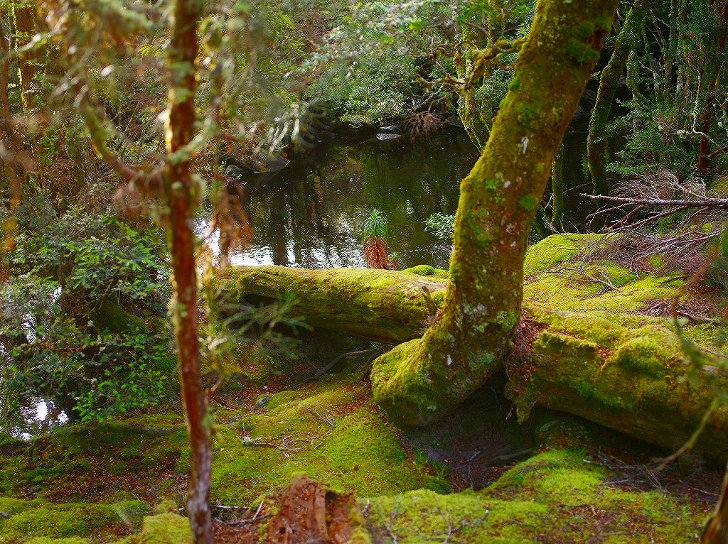 クレイドル山国立公園 エンチャンテッド･ウォーク 130202_7237